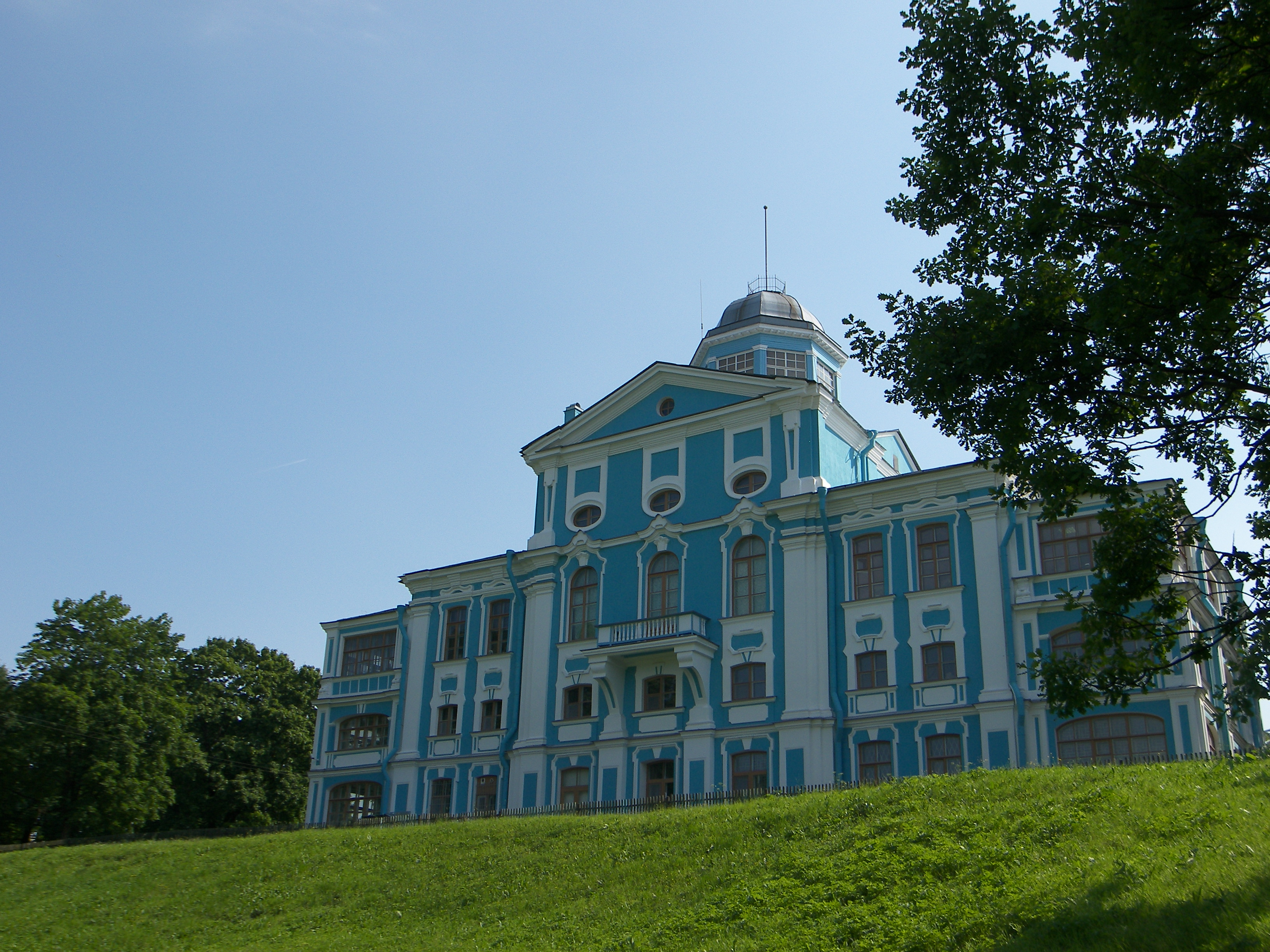 Дача Воронцова "Новознаменка", главный дом. 1750-е гг., арх. Ринальди А., 1957—1960 гг. (восстановление), арх. Плотников М. М.